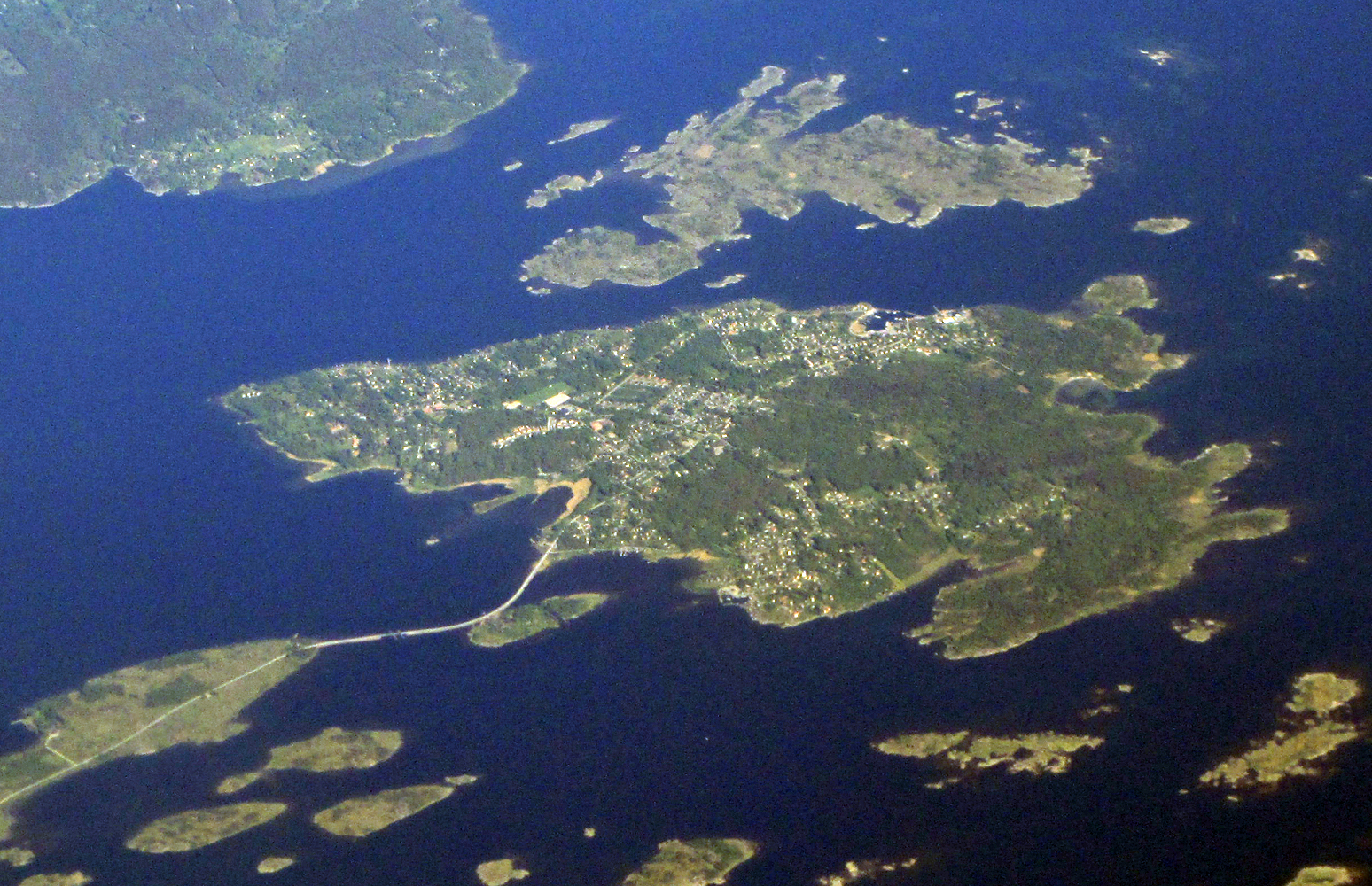 Insel Hasslö, Schweden (Luftaufnahme)